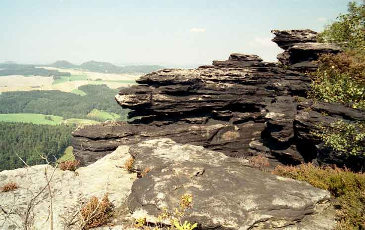 Stolová hora Kleiner Zschirnstein - skalní stěna na západním úbočí Autor: Zp